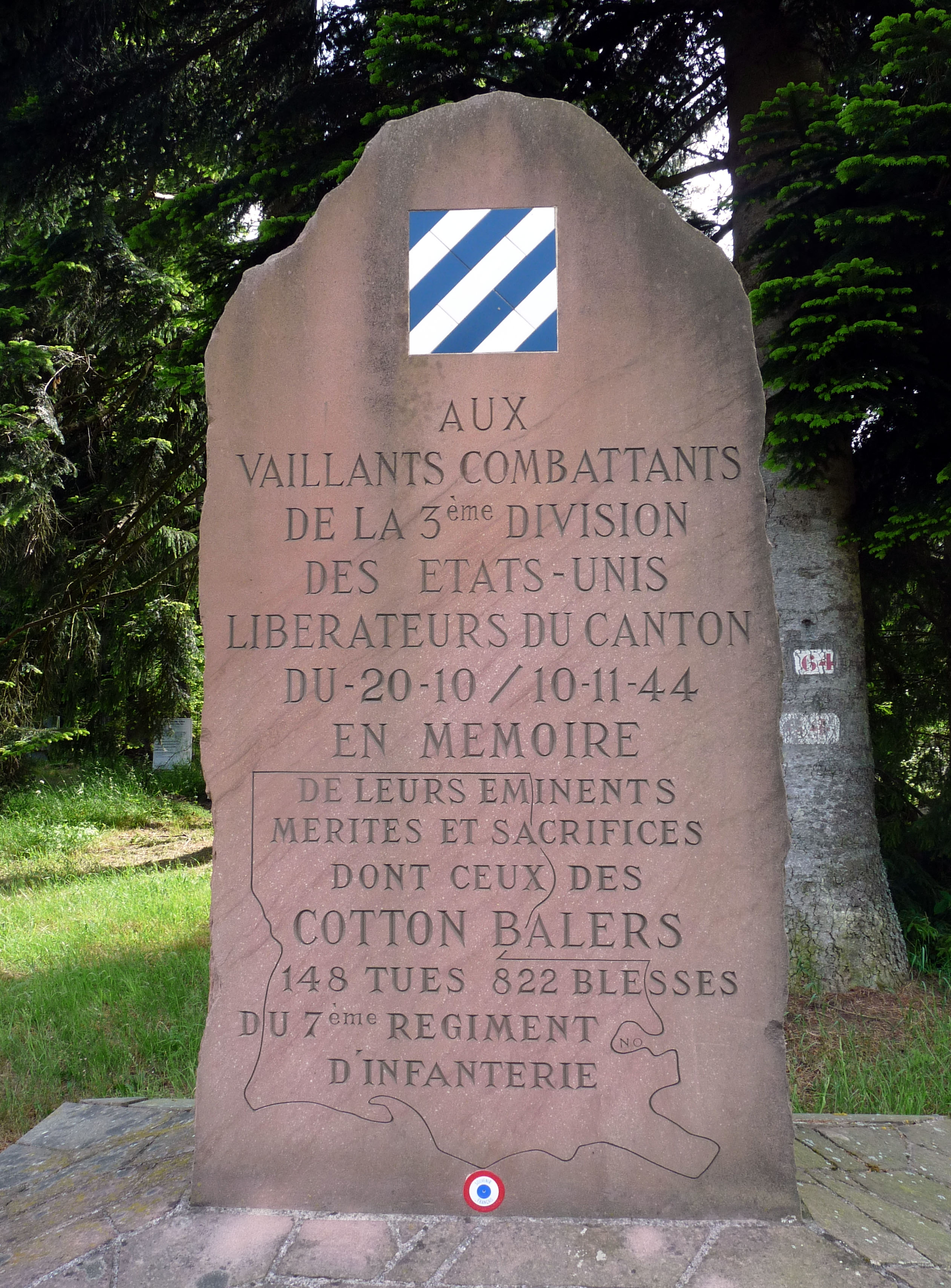 Monument dédié aux combattants de la 3ème Division des Etats-Unis libérateurs du canton en 1944 (Col du Haut Jacques)